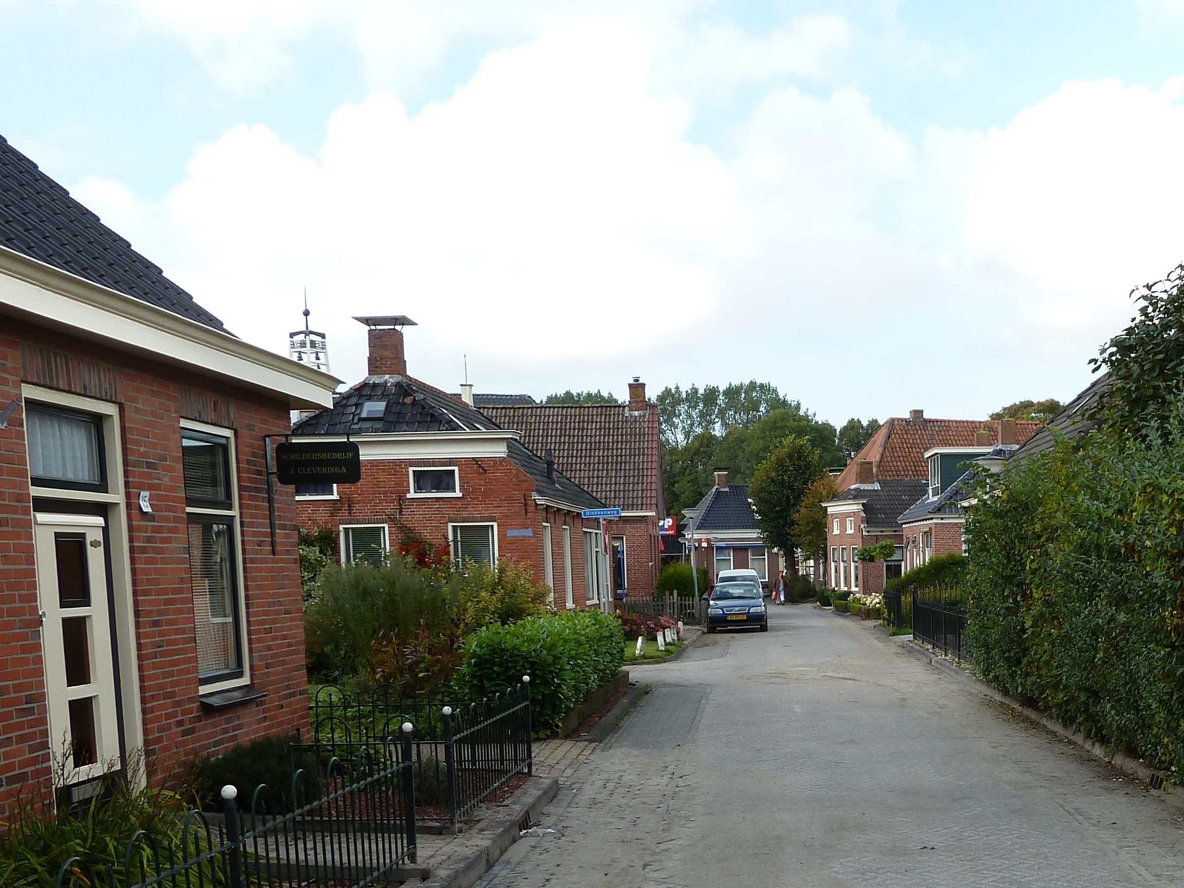 Gezicht op de Sijtsmaweg in Baflo